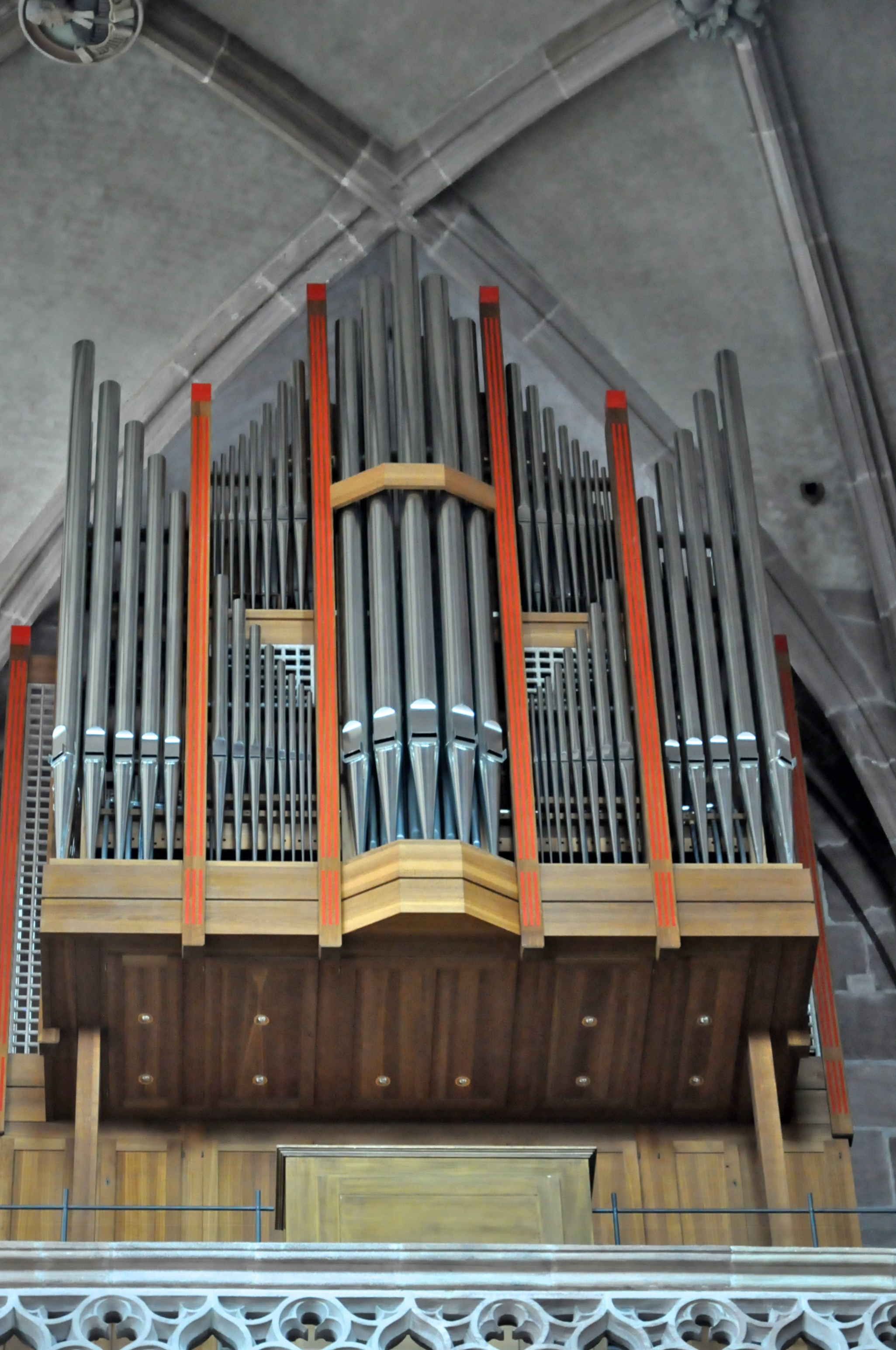 Stephanusorgel in der Lorenzkirche Nürnberg